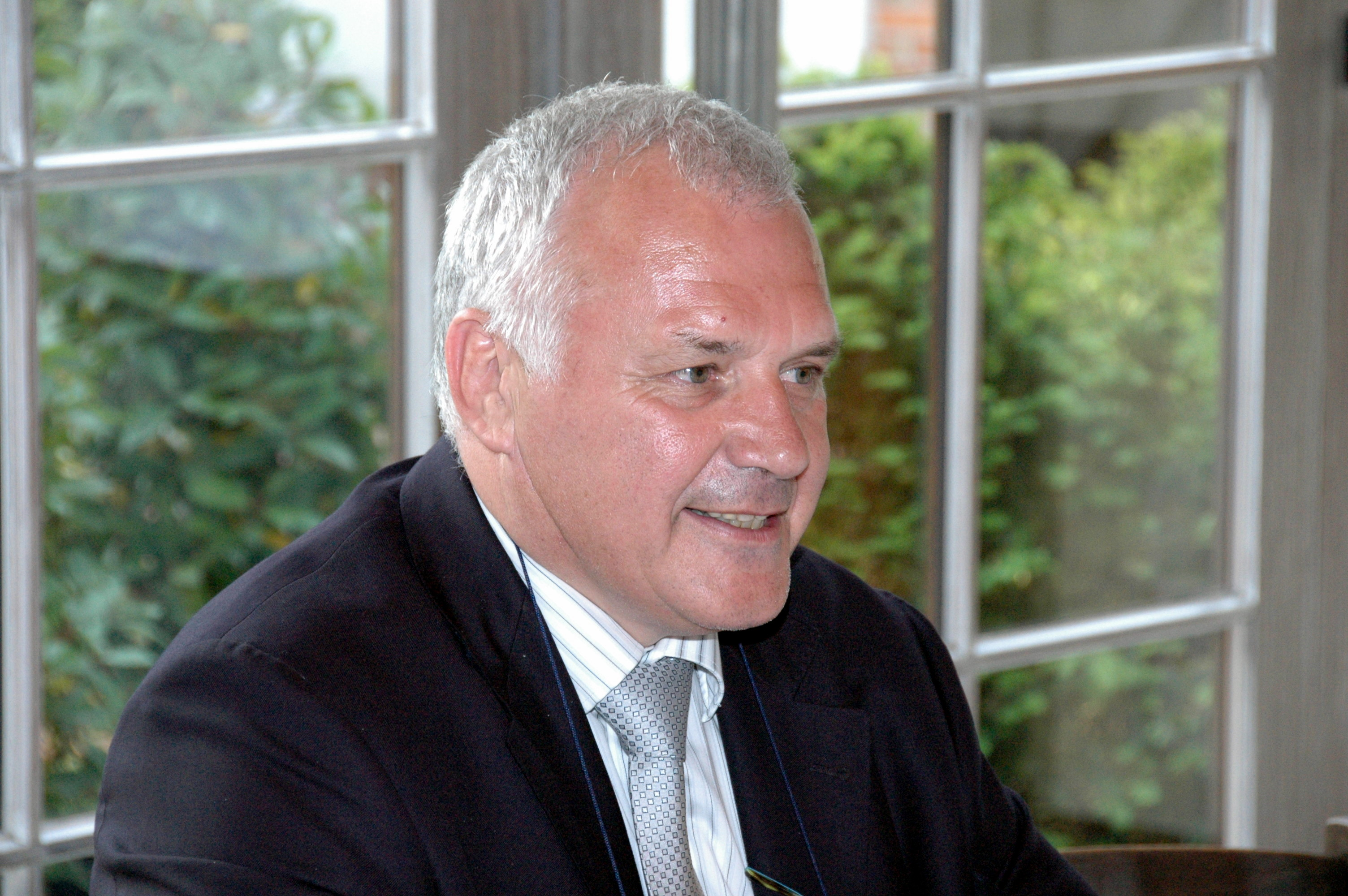 Jean-Marie Dedecker bij Lijst Dedecker persvoorstelling Wevelgem.